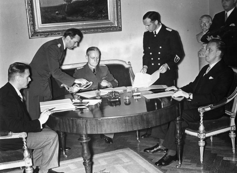 Unterzeichnung der Nichtangriffs-Verträge zwischen Deutschland, Lettland und Estland im Auswärtigen Amt Heute mittag fand im Auswärtigen Amt die Unterzeichnung der Nichtangriffsverträge zwischen Deutschland, Lettland und Estland statt. U.B.z. von links nach rechts: Aussenminister Munters (Lettland), Reichsaussenminister von Ribbentrop und Aussenminister Selter (Estland) bei der Unterzeichnung der Verträge. Fot. Mü[ller], 7.6.39 Scherl Bilderdienst Berlin